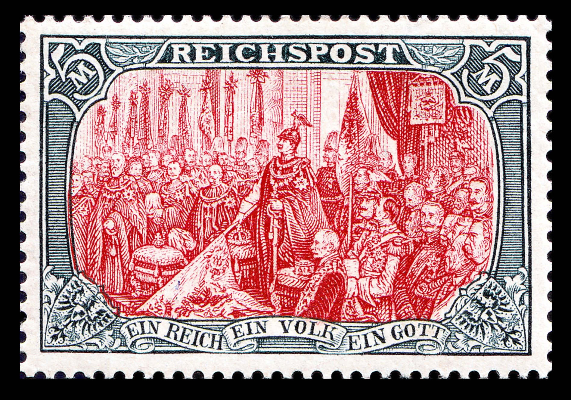 Germania 66 Type Ia mit Nachmalung Deckweiß postfrisch geprüft Jaeschke Lantelme